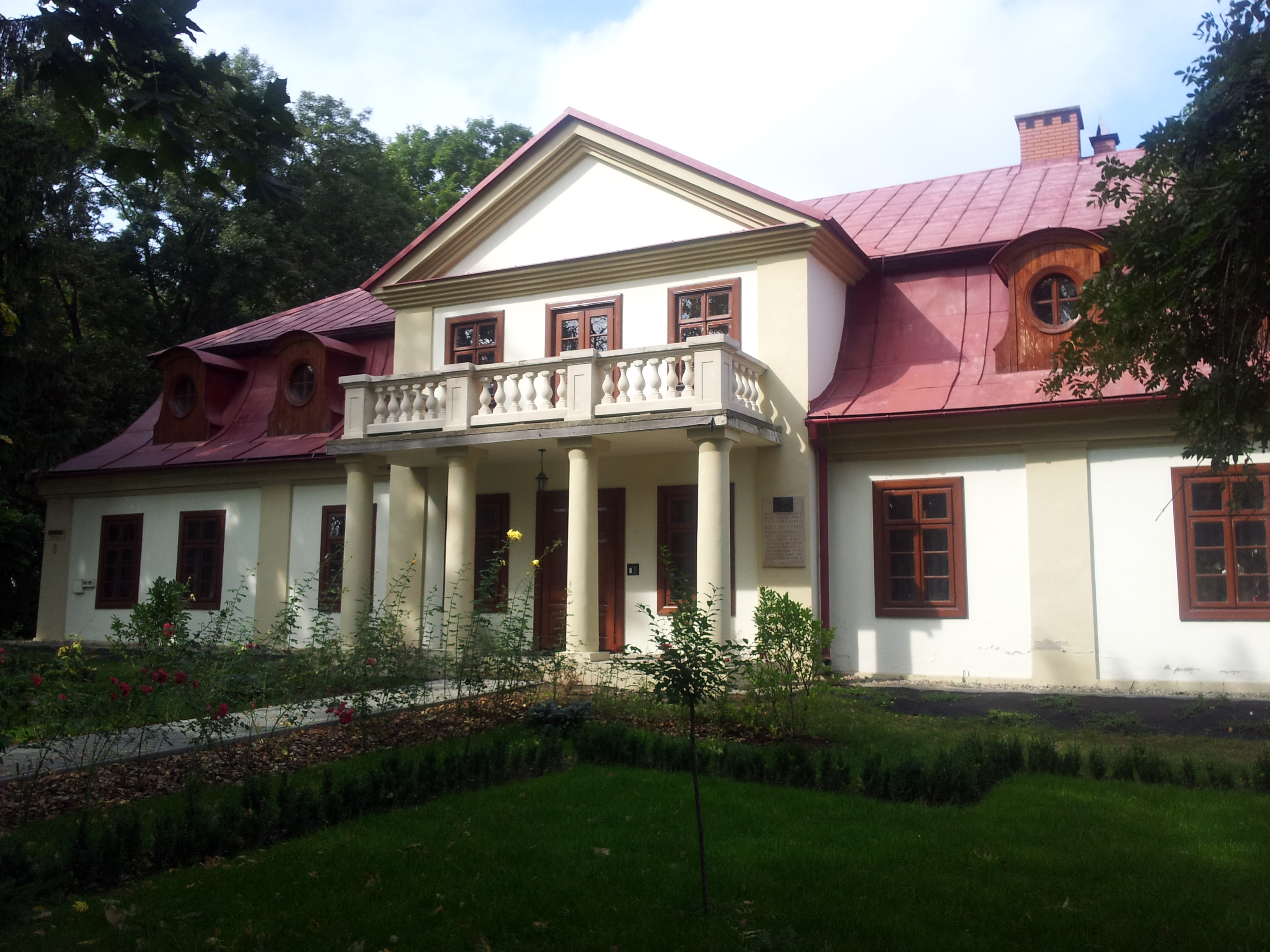 Hrubieszów, plebania, XVIII, XIX